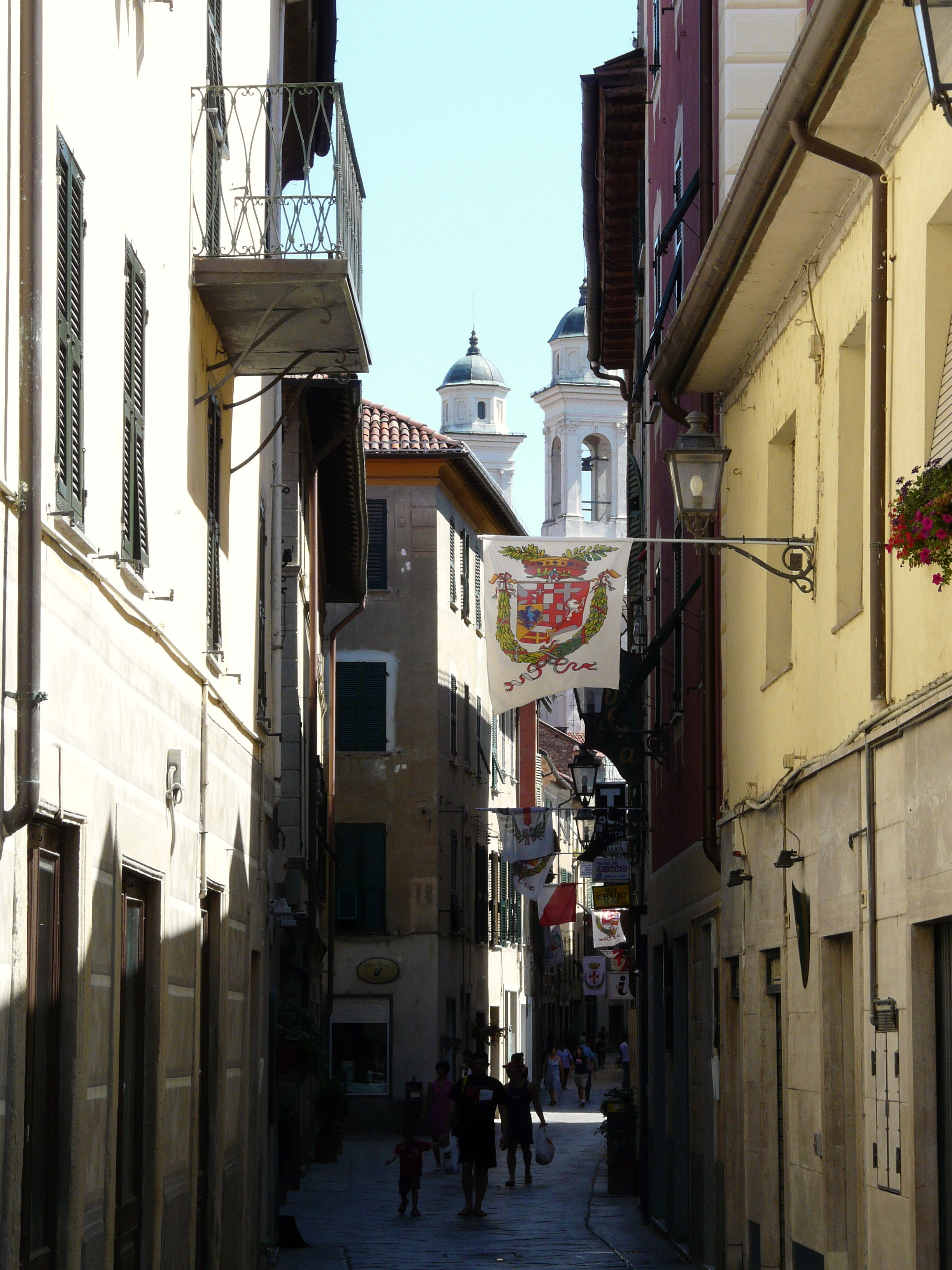 Scorcio da via Benedetto Cairoli, Ovada, Piemonte, Italia